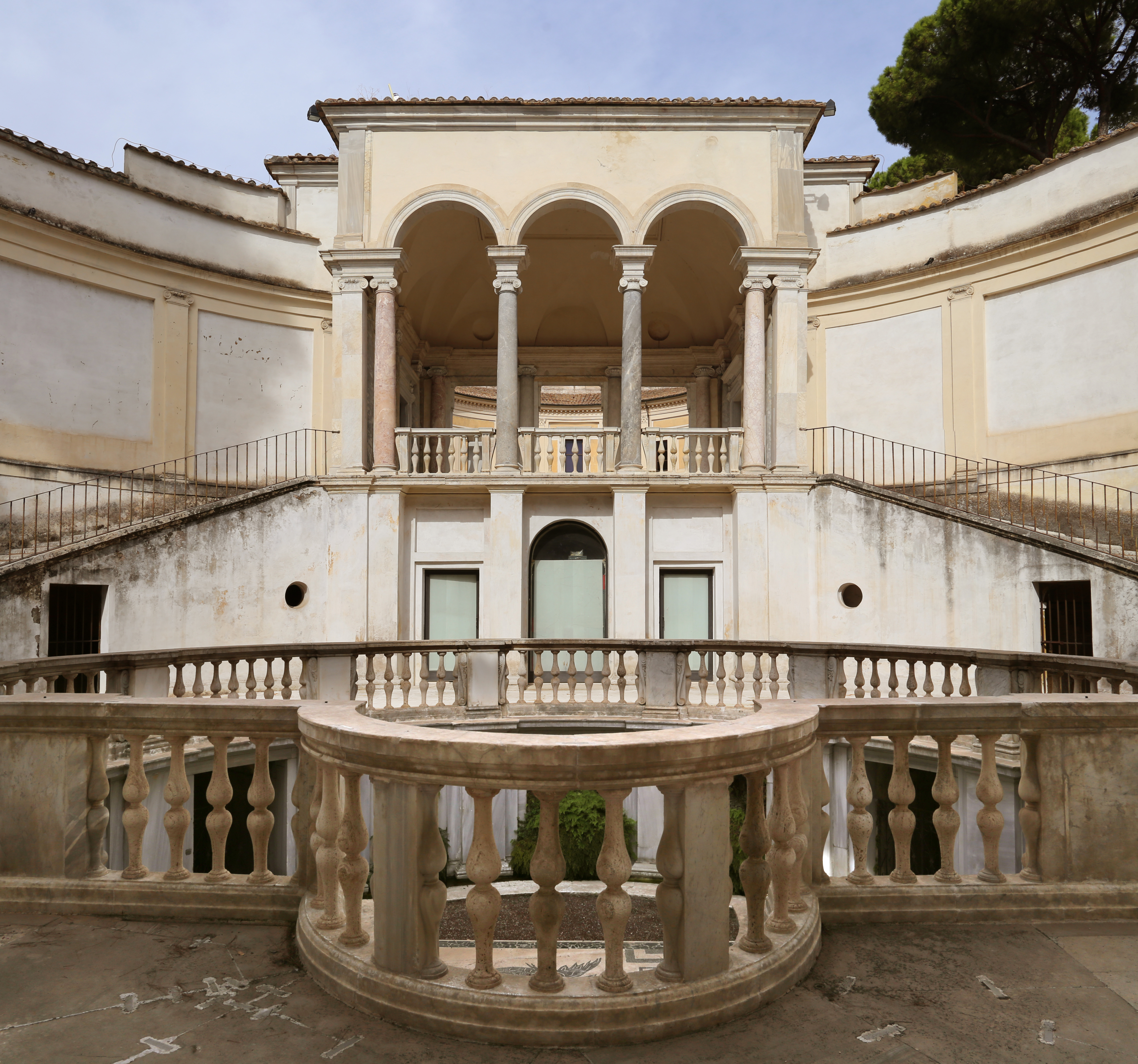 Villa Giulia (Rome) This is a photo of a monument which is part of cultural heritage of Italy.